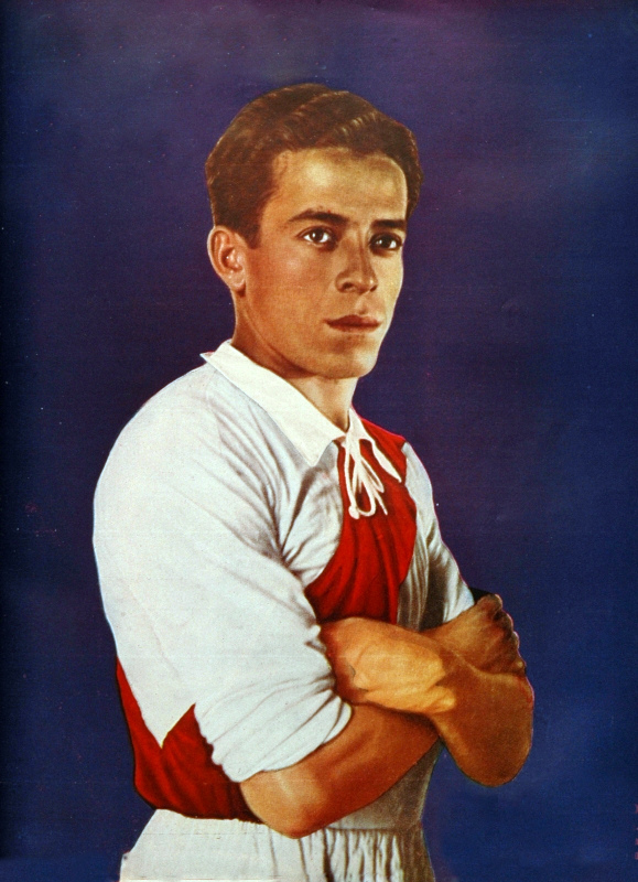 Tapa de la revista El Gráfico N° 919: Segundo Castillo, mediocampista de la selección peruana de fútbol.